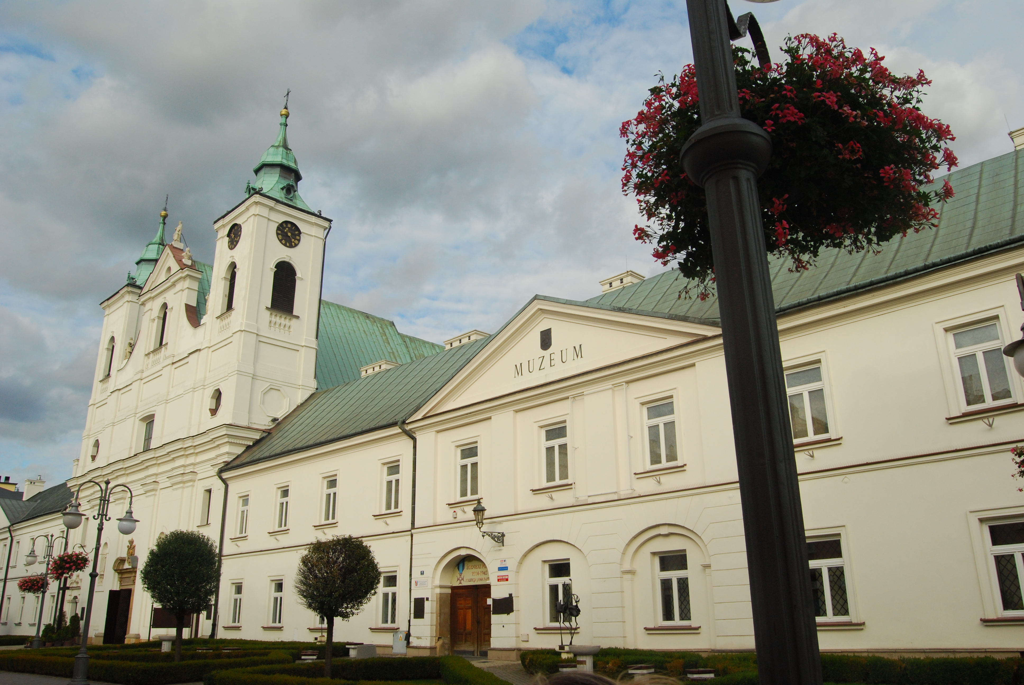 Rzeszów, zespół klasztorny pijarów, 1642-1646, 1703-1707